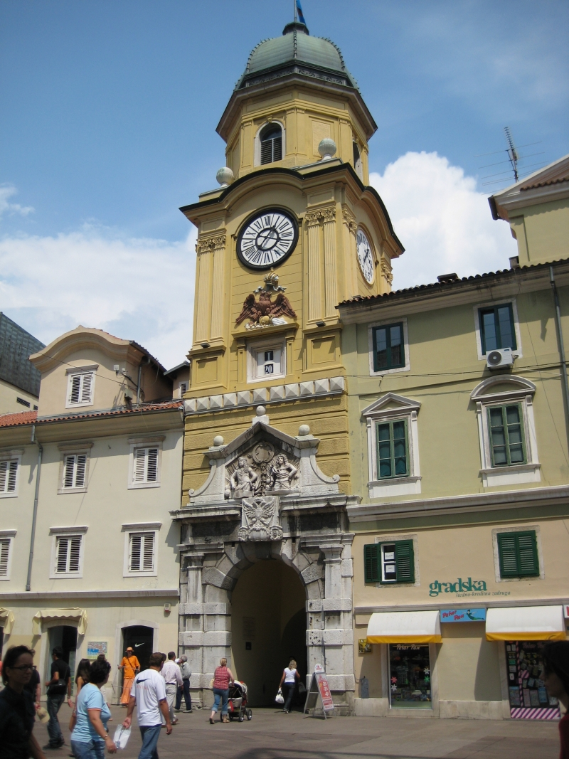 Gradski toranj na kojeg se u 17. stoljeću dodaju dekorativni elementi, grbovi, portreti vladara iz habsburške dinastije. Ispod grba, (dodijeljenog 6. lipnja 1659) je dvoglavi orao s obje glave okrenute na istu stranu, koji stoji na posudi iz koje teče voda u more, je deviza IDEFICIENTER, što znači nepresušivo, a uz bistu cara Leopolda I. postavljena je i bista Karla VI., koji je grad Rijeku 18. ožujka 1719. godine proglasio slobodnom lukom.